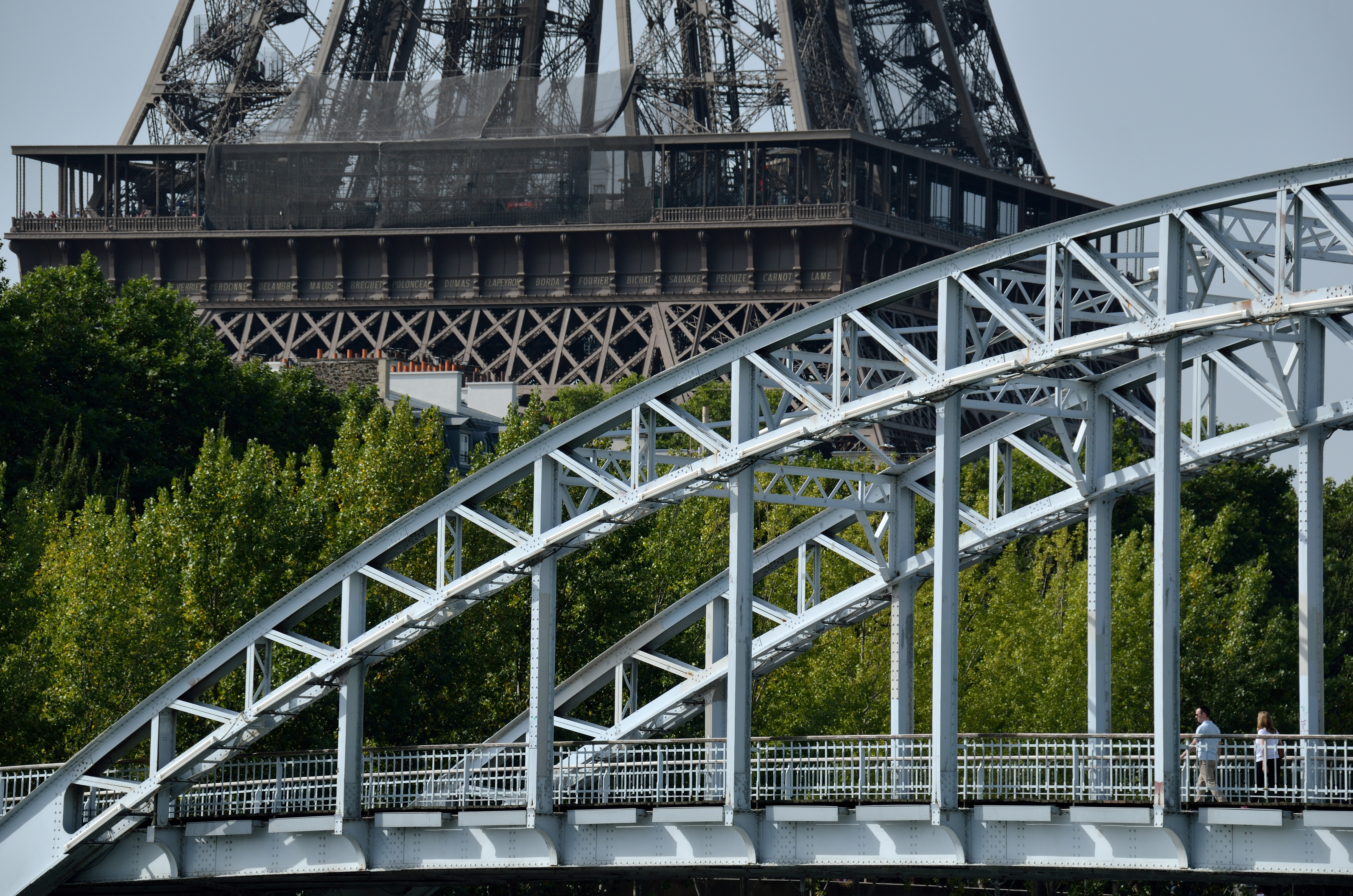 Exemple des grandes constructions métalliques à Paris, la tour Eiffel et le passerelle Debilly.